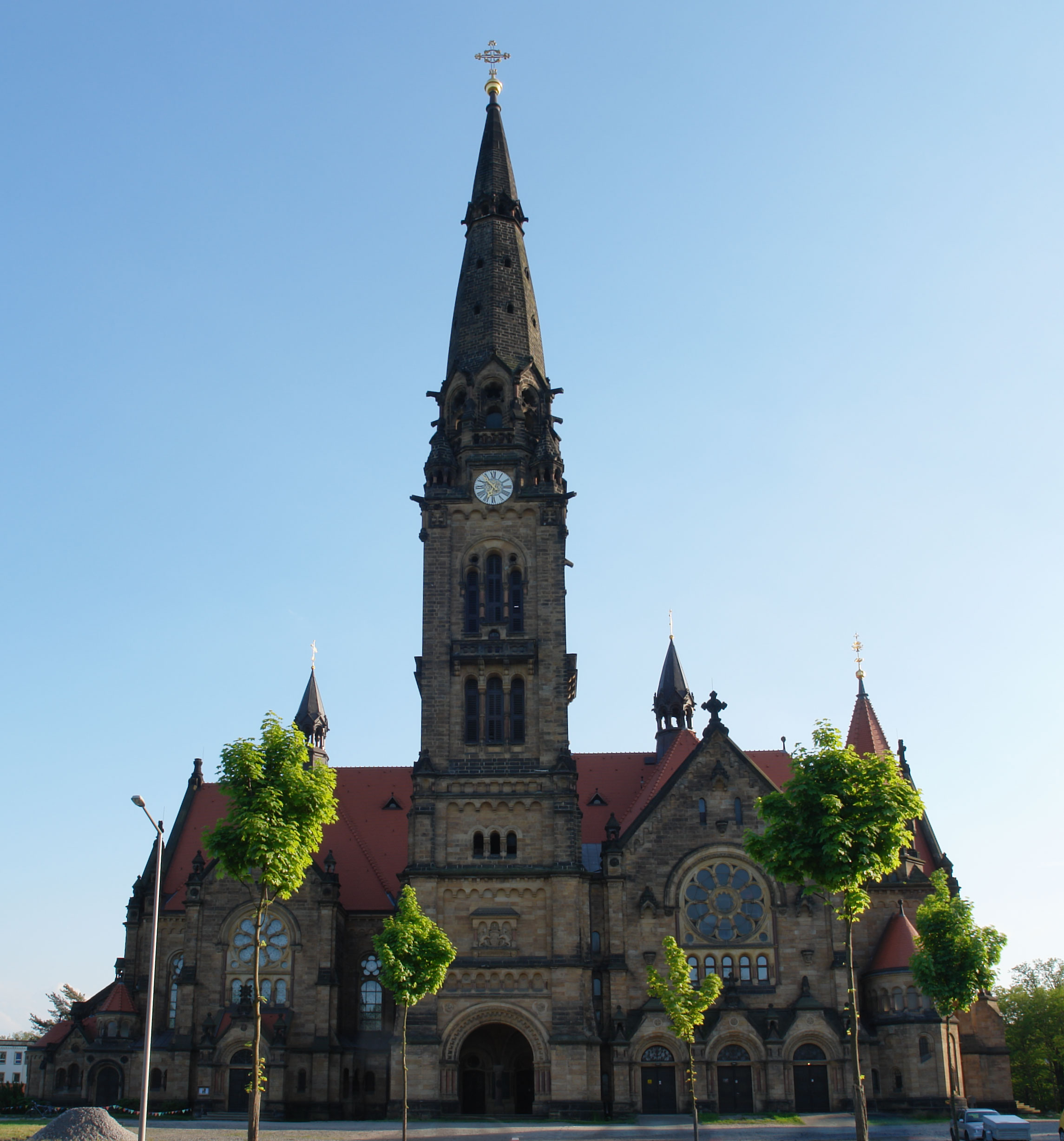 Nordseite der Garnisonskirche, Dresden.